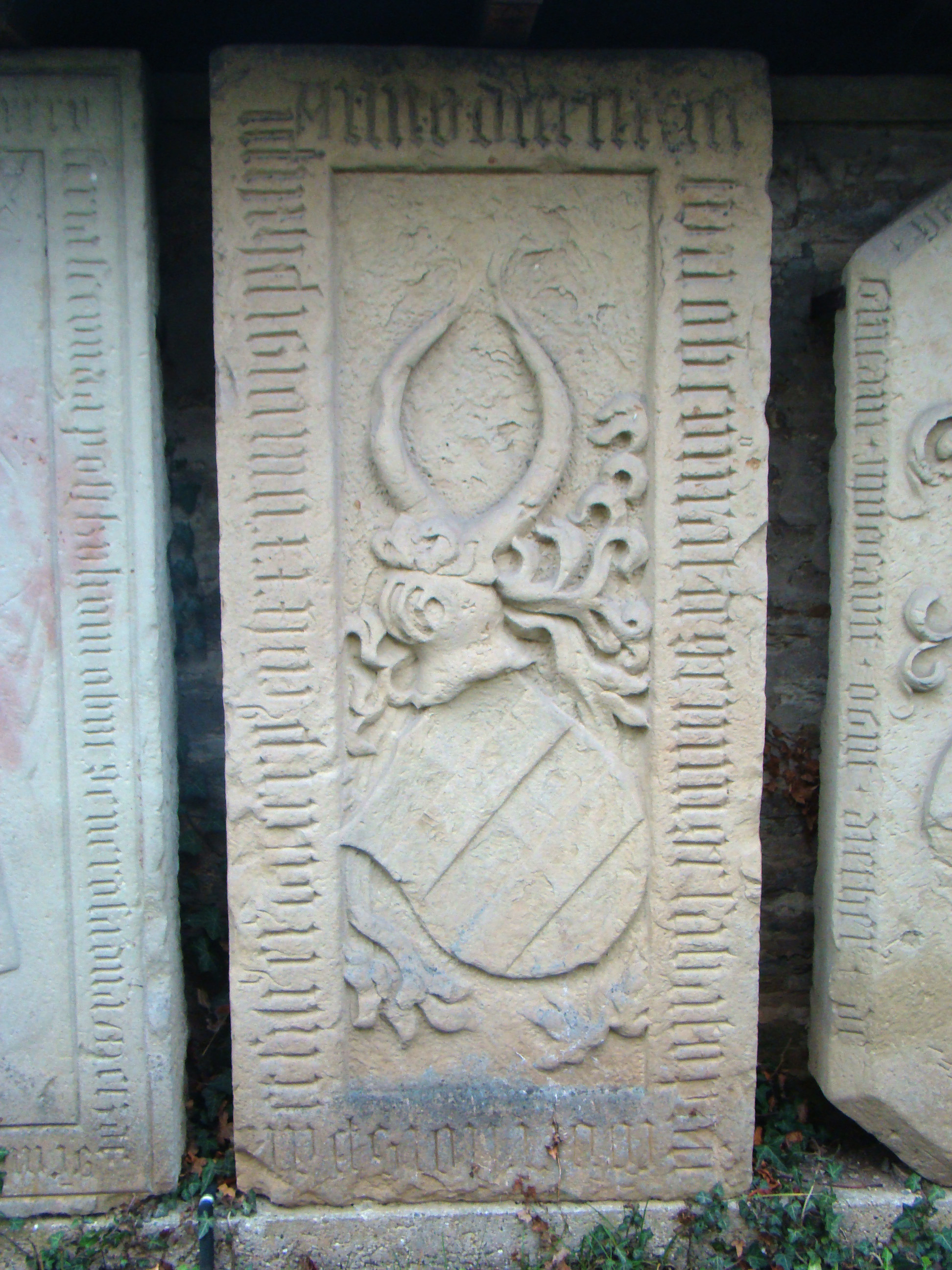 Historische Grabmale beim Unterschloss Gemmingen: Grabplatte für Konrad von Gemmingen († 1463) und seinen 1482 verstorbenen Sohn Dieter.